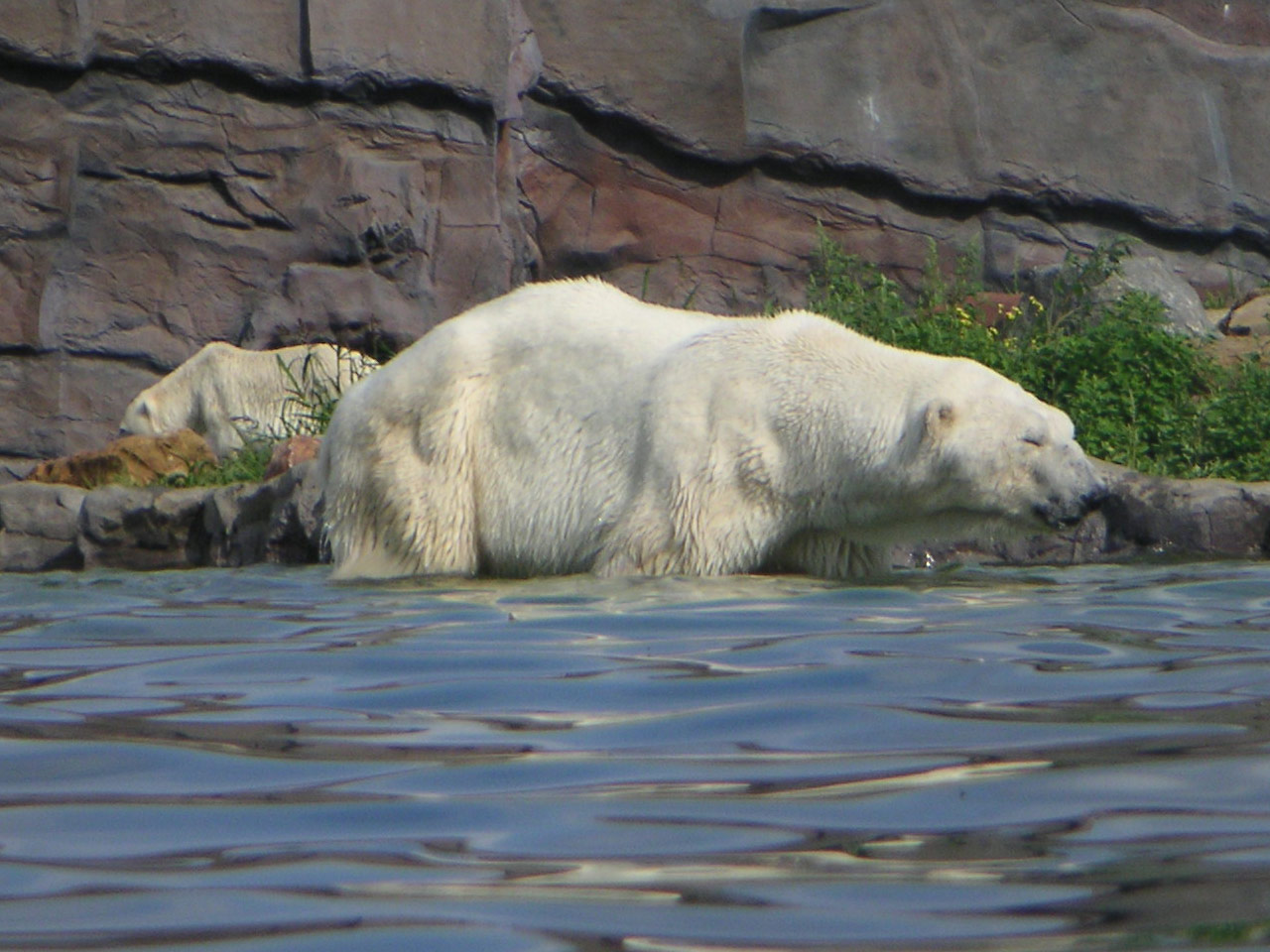 Auf dem Bild sind zwei Eisbären im ZOOM Gelsenkirchen zu sehen.